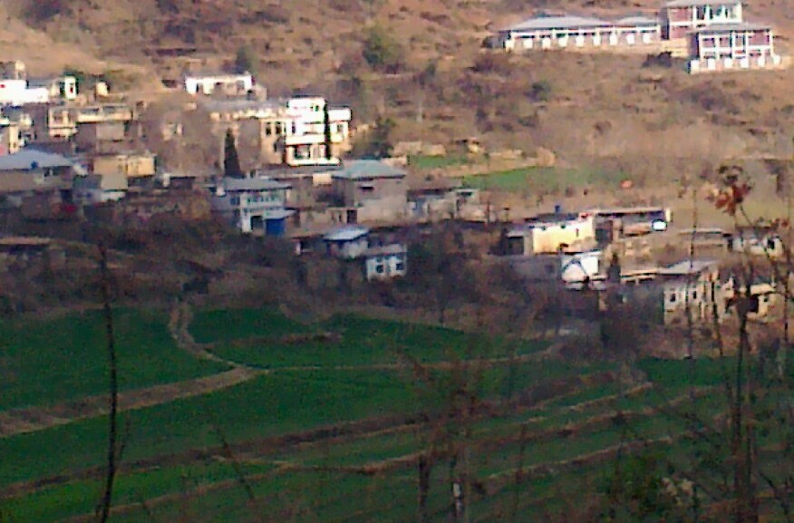 Sanila Puran Shangla